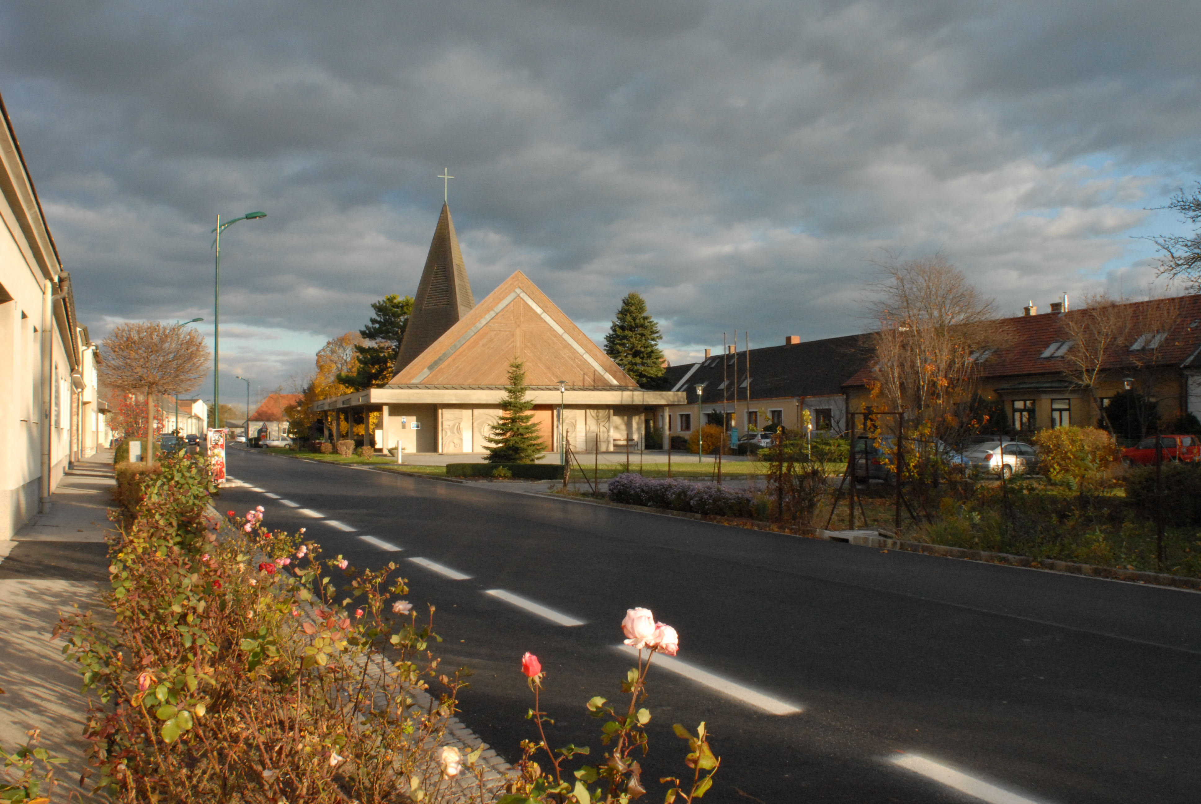 Die Kirche wurde eingeweiht 1965. Architekten waren Dilp. Ing. Kurt Eckel und Dipl.Ing. Dr. Sepp Stein, Staiker Dipl. Ing. Heinz Hausner, Bildhauer (Relief an der Stirnseite) Fritz Tiefenthaler, Glasfenster Josef Mikl.